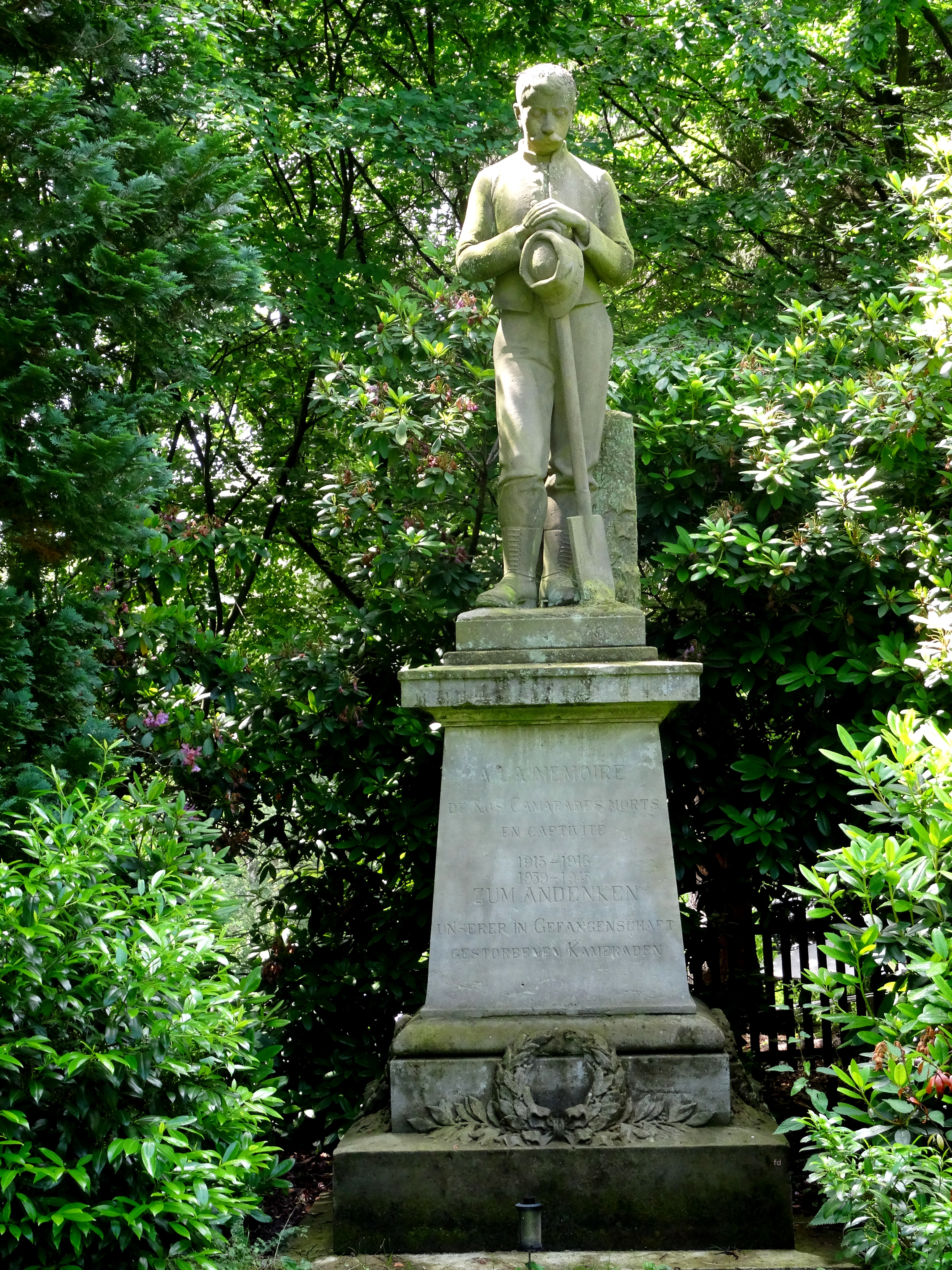 Waldfriedhof Fulmecke französisches Ehrenmal